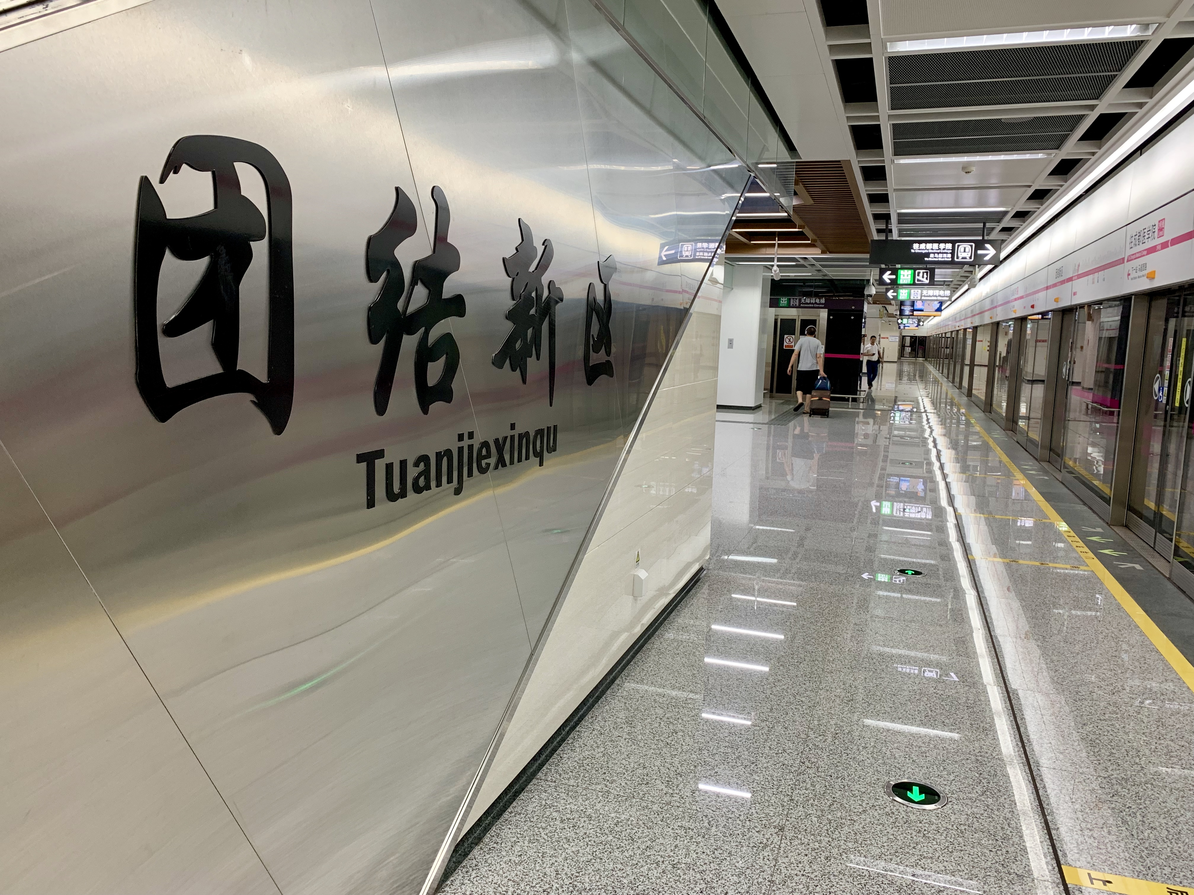 成都地铁团结新区站